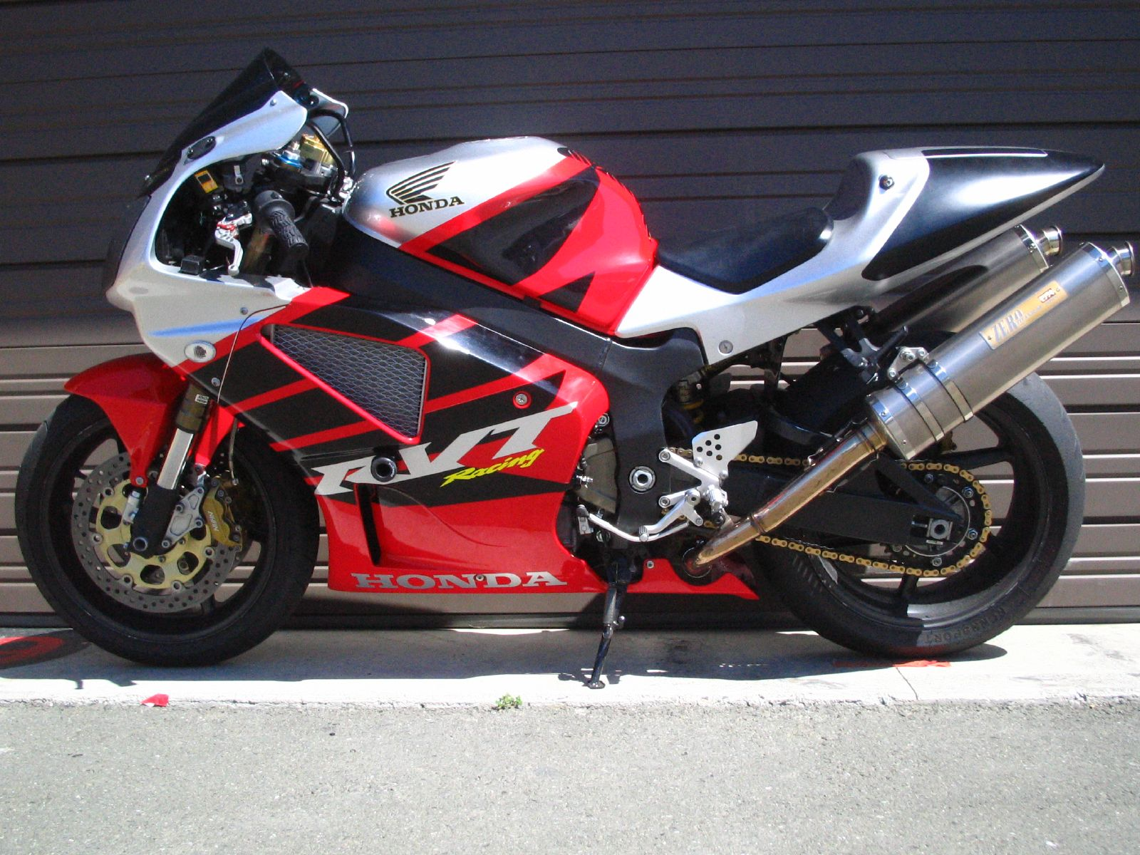 2001 Honda RC51 (RVT1000R) SP1